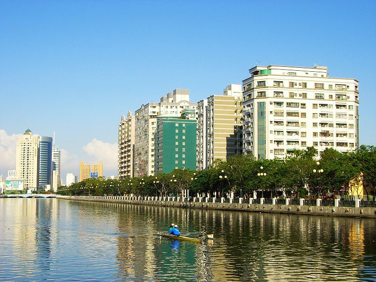 Tainan City, Taiwan